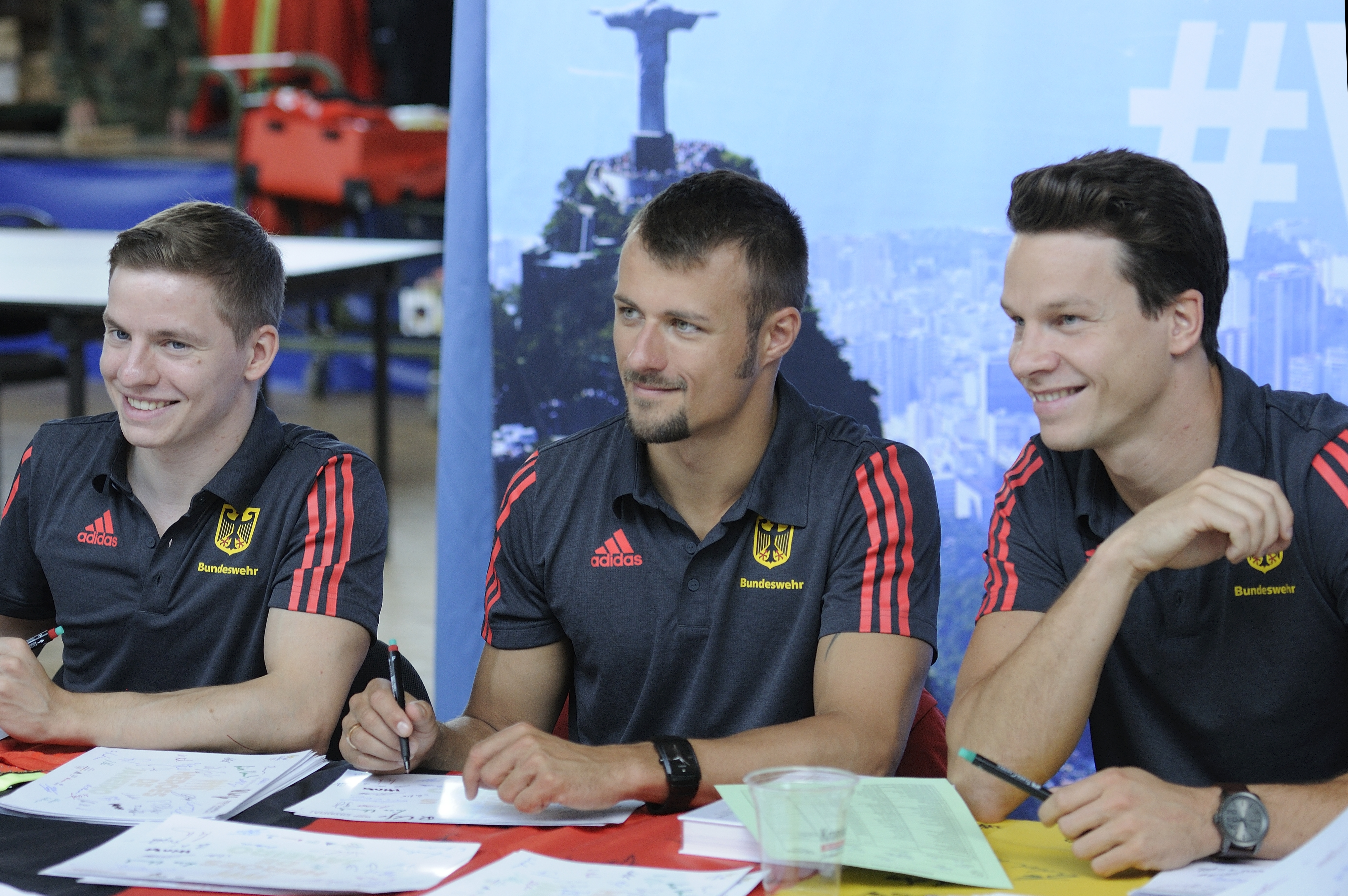 Bild aufgenommen in Hannover während der Einkleidung der deutschen Olympiamannschaft 2016. Martin Wolfram, Patrick Hausding und Sascha Klein.